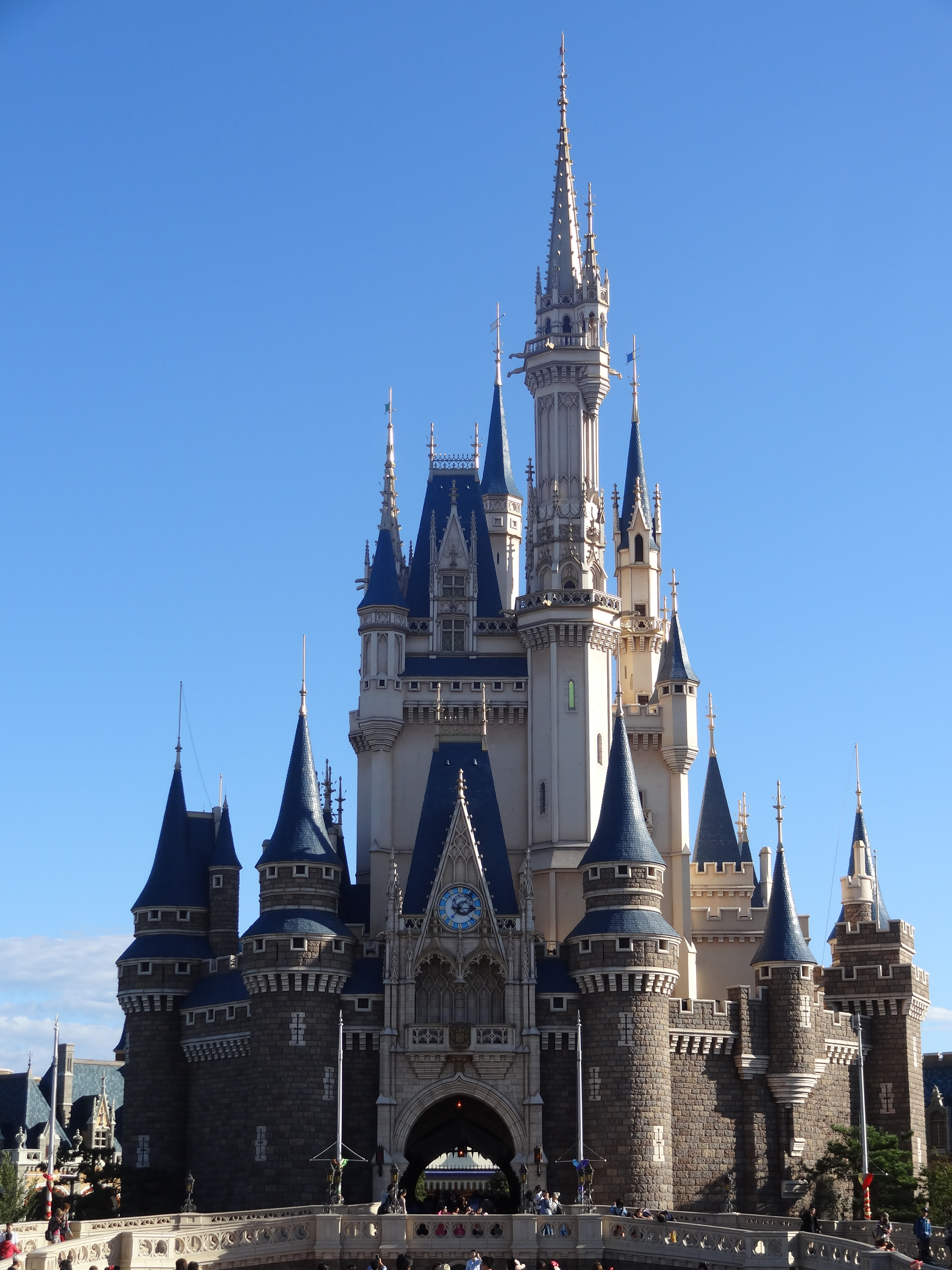 Cinderella Castle à Tokyo Disneyland